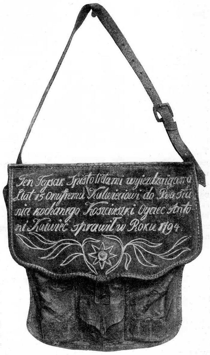 Ilustracja Encyklopedii staropolskiej T.4 371 - Tejsak na pistolety, wiek XVIII